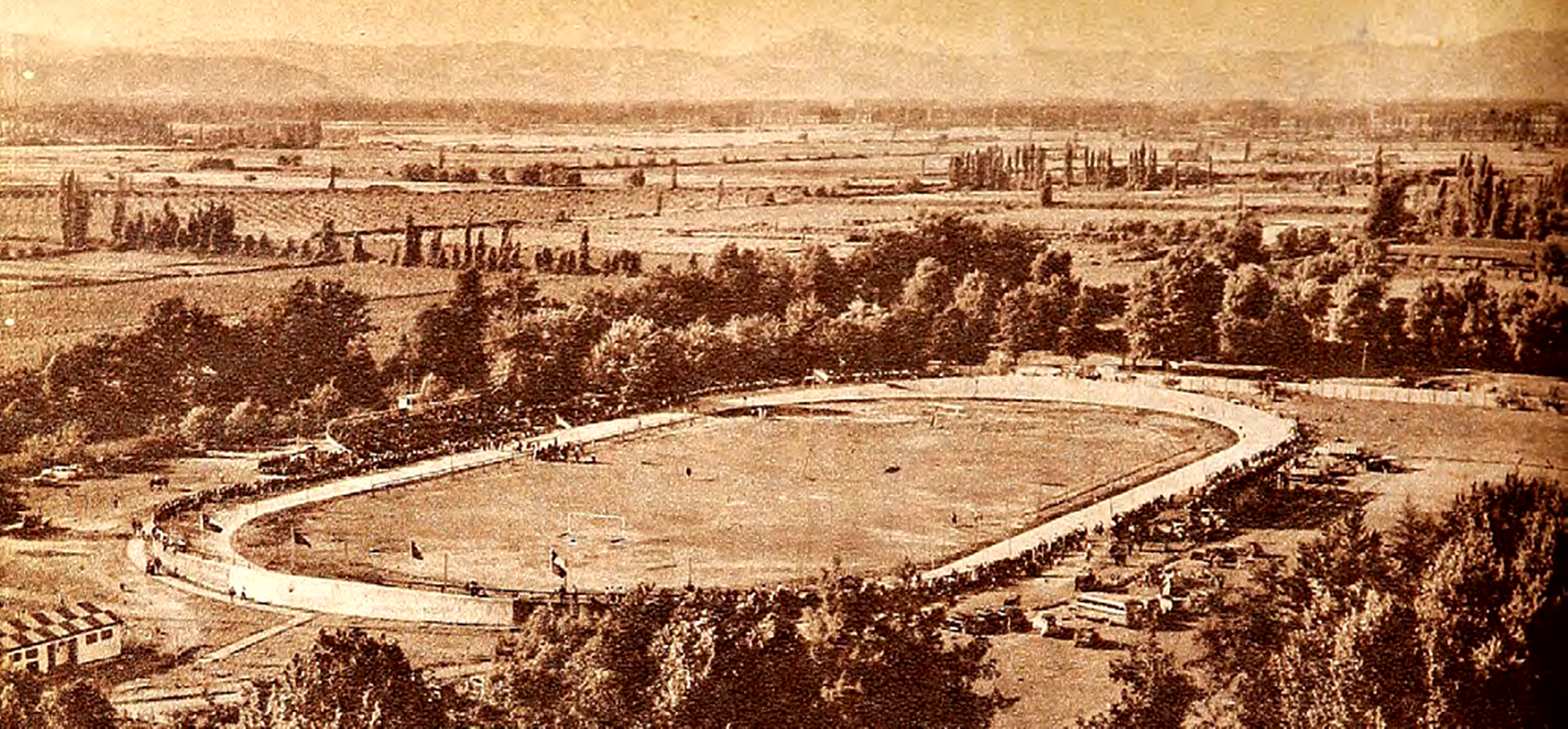 Así lucía en 1954 el velódromo pavimentado de La Granja, Curicó, Chile. El año anterior, en 1953, fue escenario del Campeonato Nacional de Ciclismo de su país / Velodrome located in La Granja, Curicó, Chile, in 1954, in 1953 was the scene of the national cycling tournament.